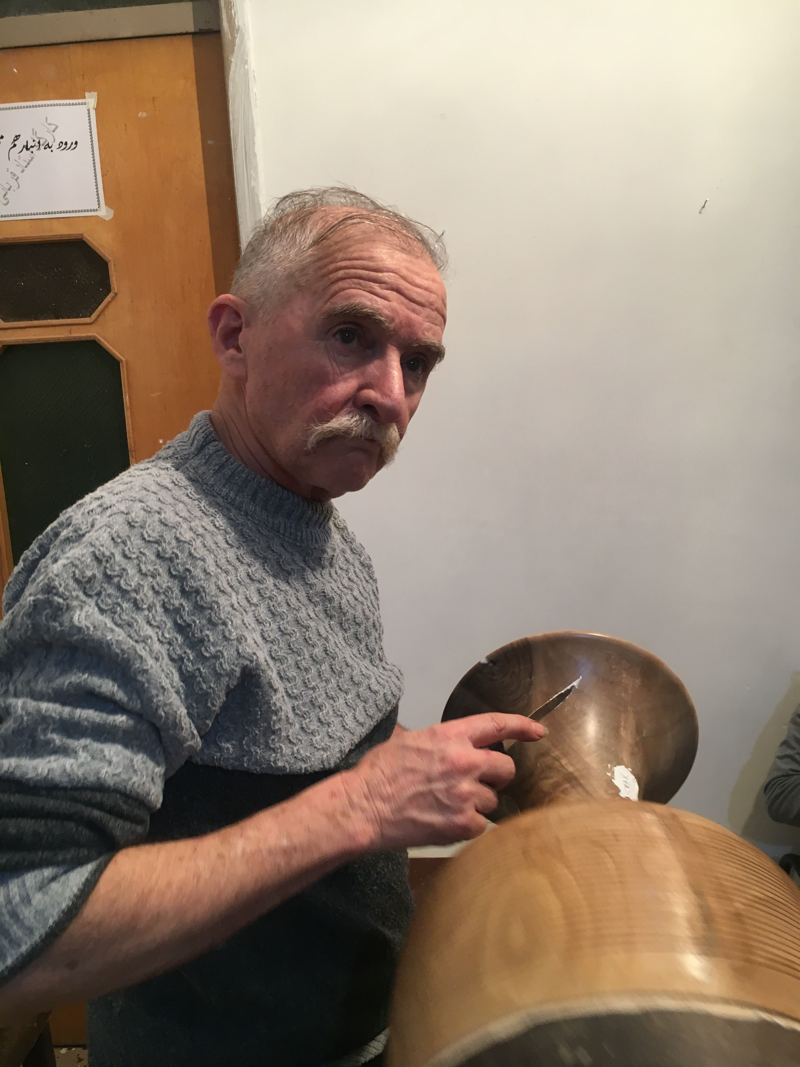 استاد جمشيد محبي در كارگاه تنبك سازي حسين قرباني در روستاي احمد آباد عكس از محمد رضا رمضاني